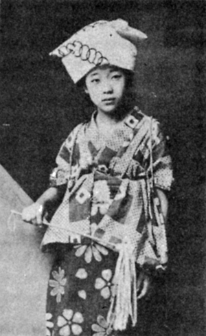 川端康成ののちの婚約相手、伊藤初代の13歳の時の写真